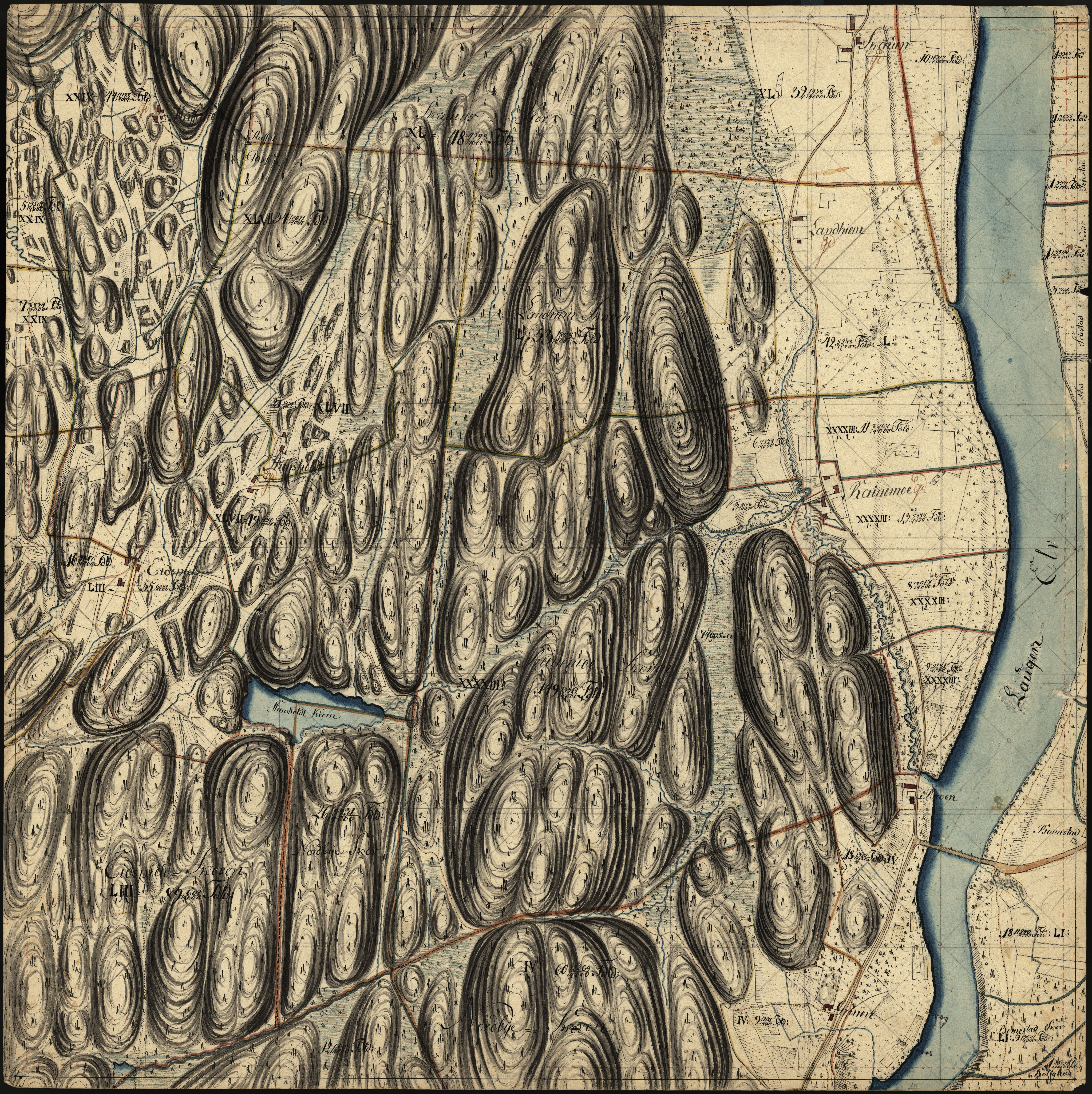 Usikkert produksjonsår.